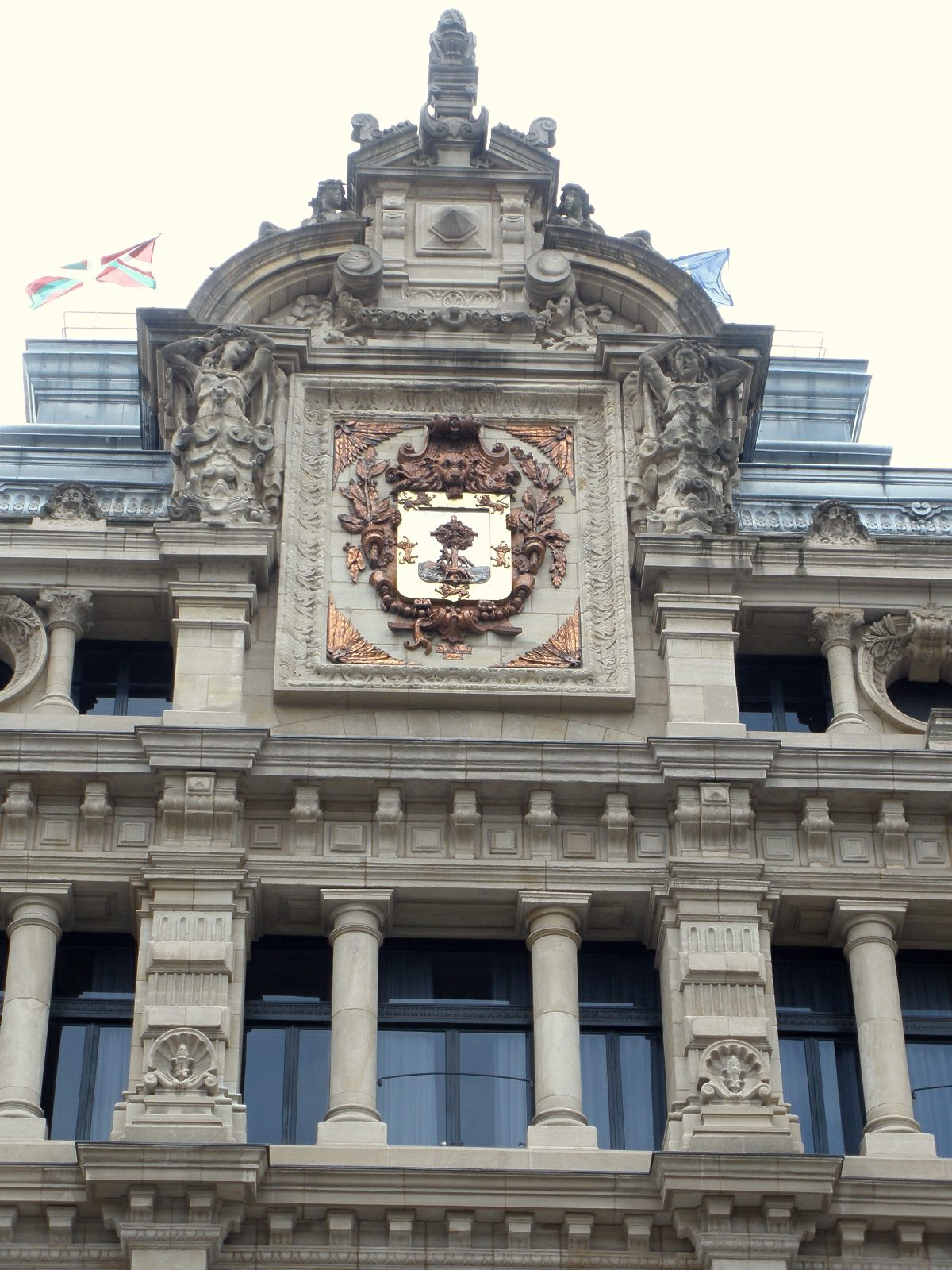 Diputación Foral de Vizcaya, Bilbao (País Vasco, España)